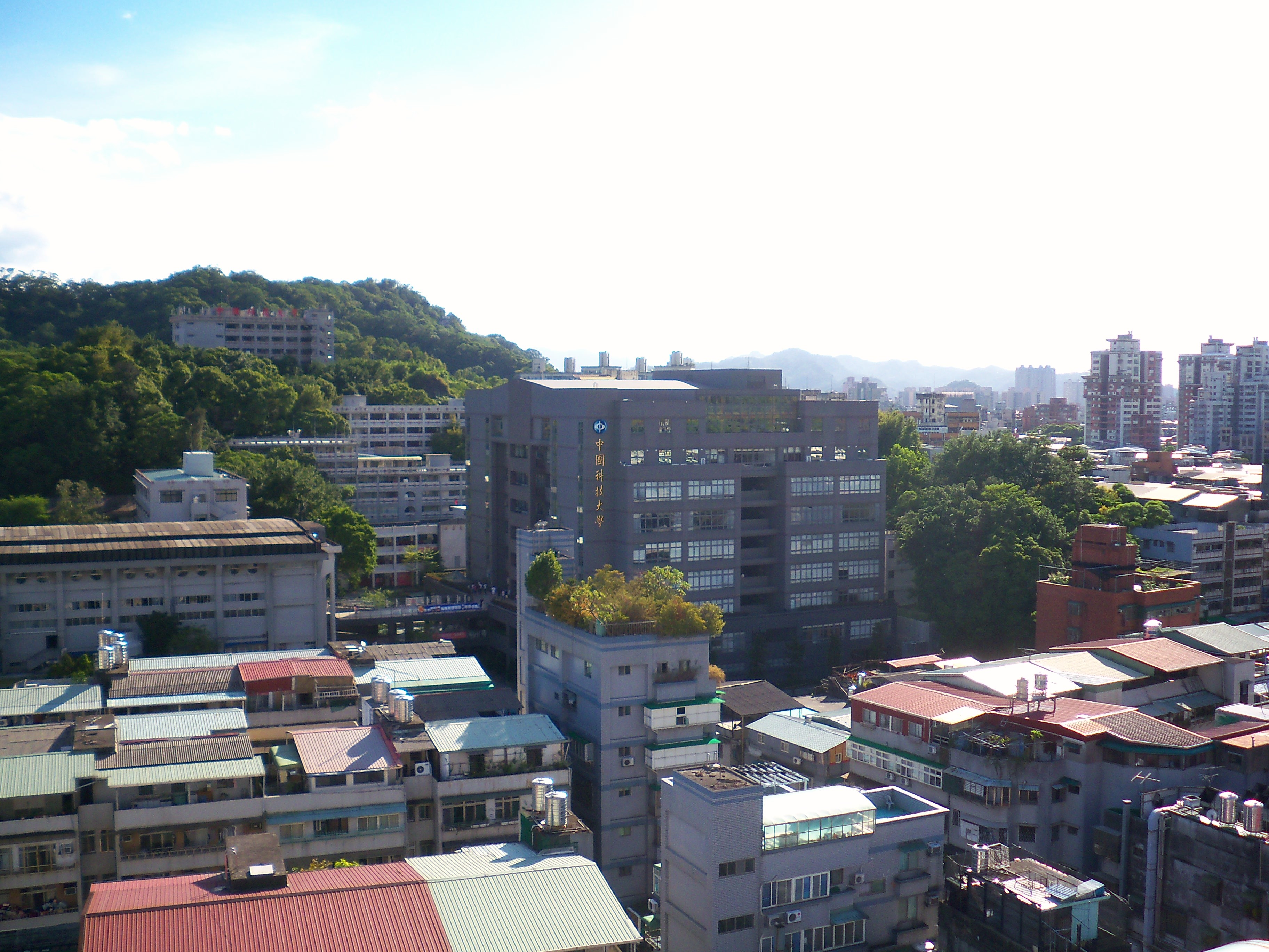 中国科技大学文山キャンパス、所在地：台湾台北市文山区興隆路三段56号。